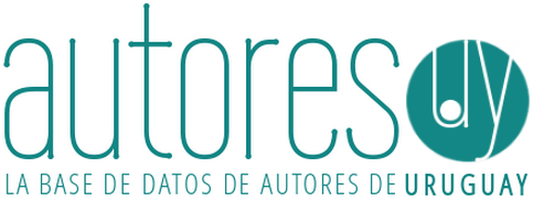 Logo del portal Base de datos de autores de Uruguay "autores.uy"